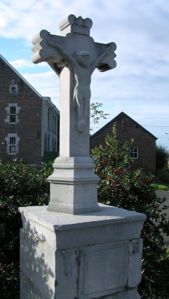 Retinne (Ortsteil von Fléron), "Christus mit doppeltem Gesicht" von 1752